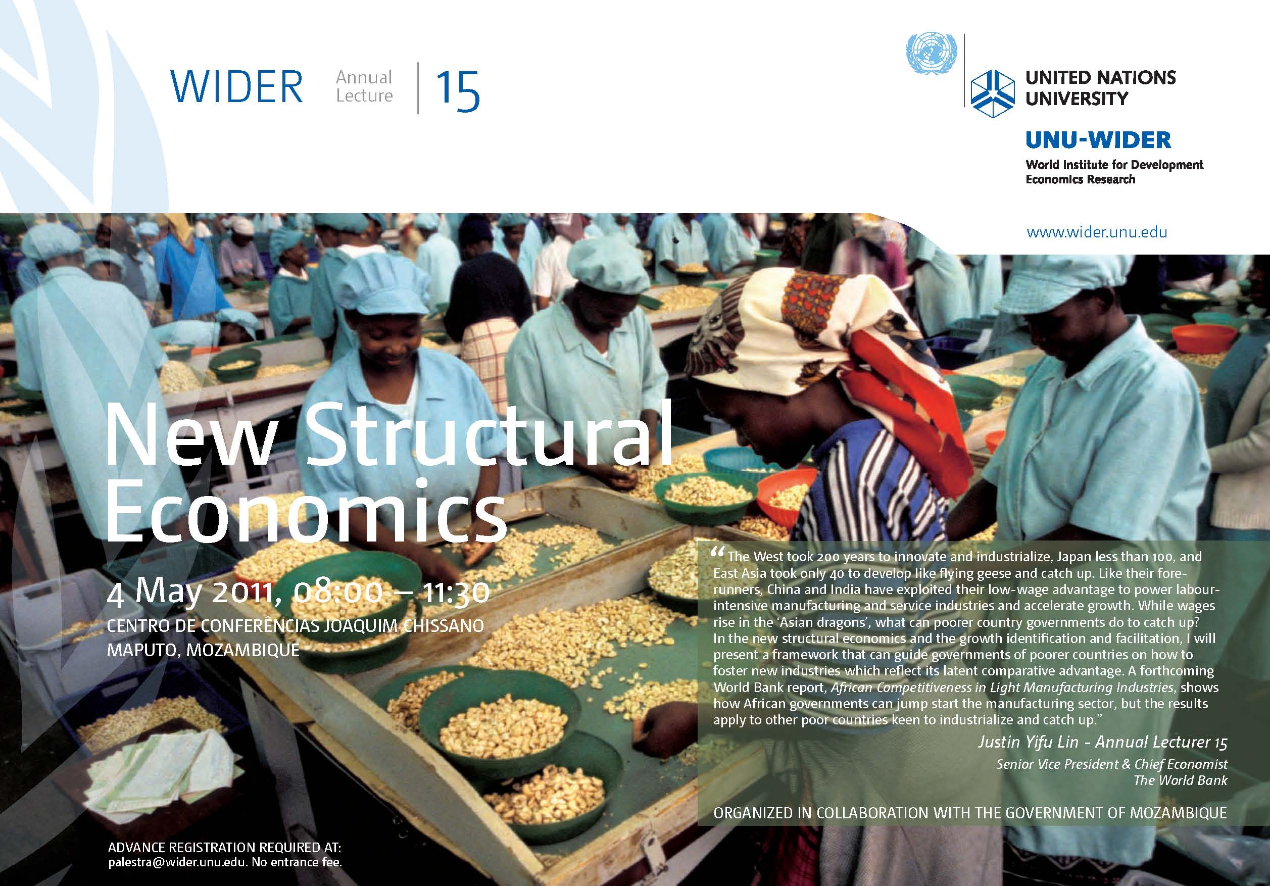 4 May 2011